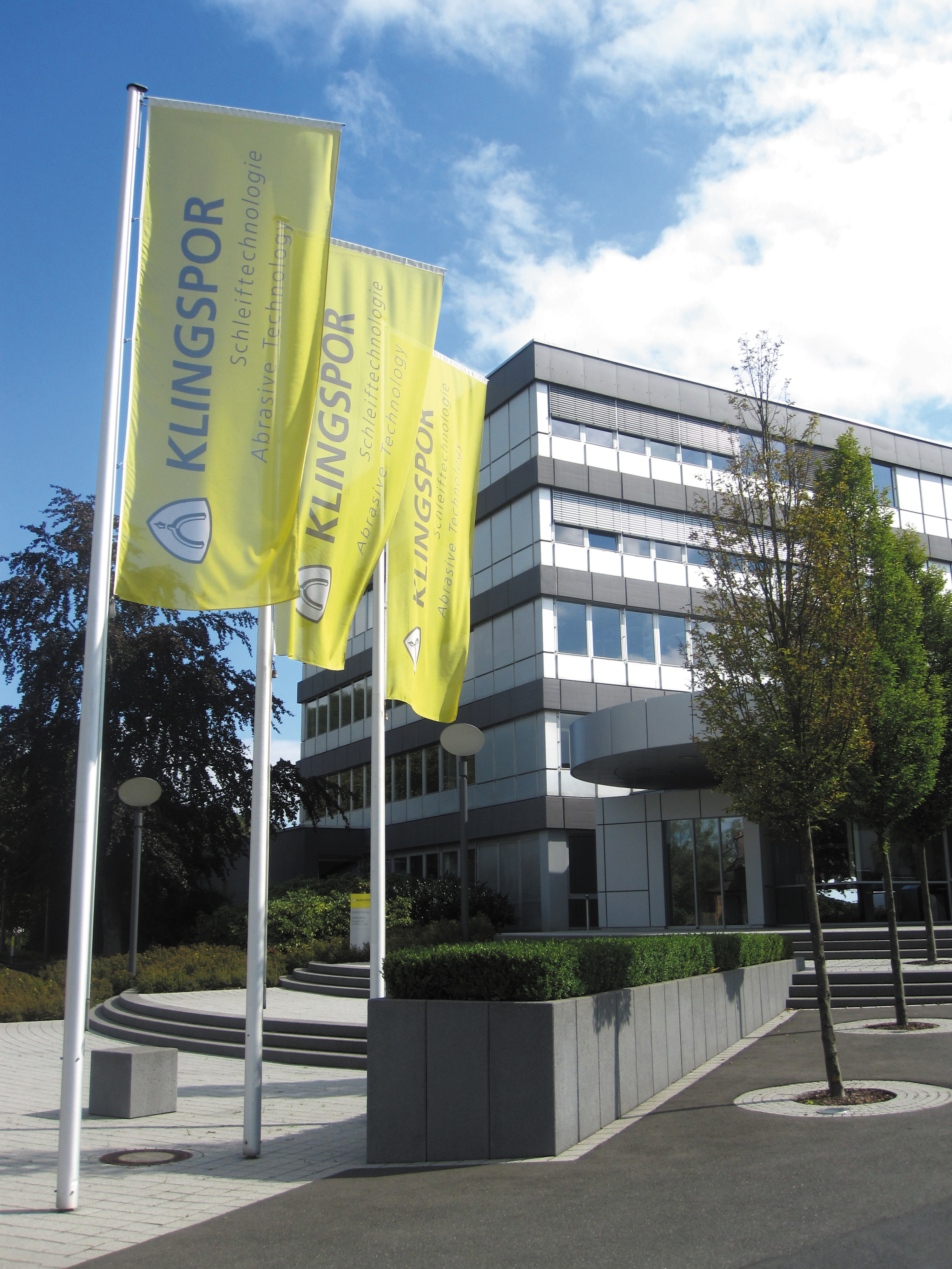 Das Verwaltungsgbäude der Klinspor AG in Haiger